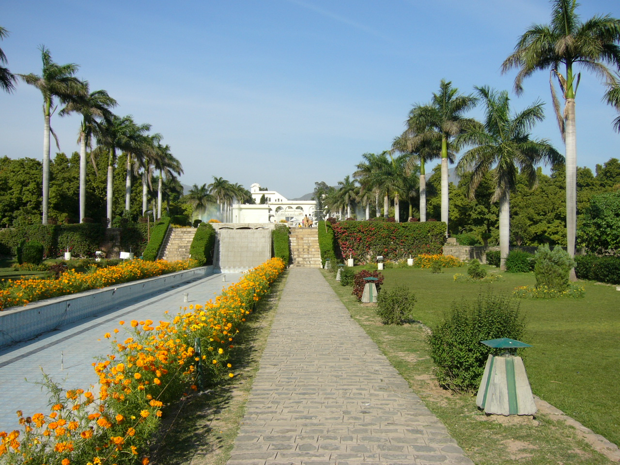 Pinjore Garden Chandigarh India